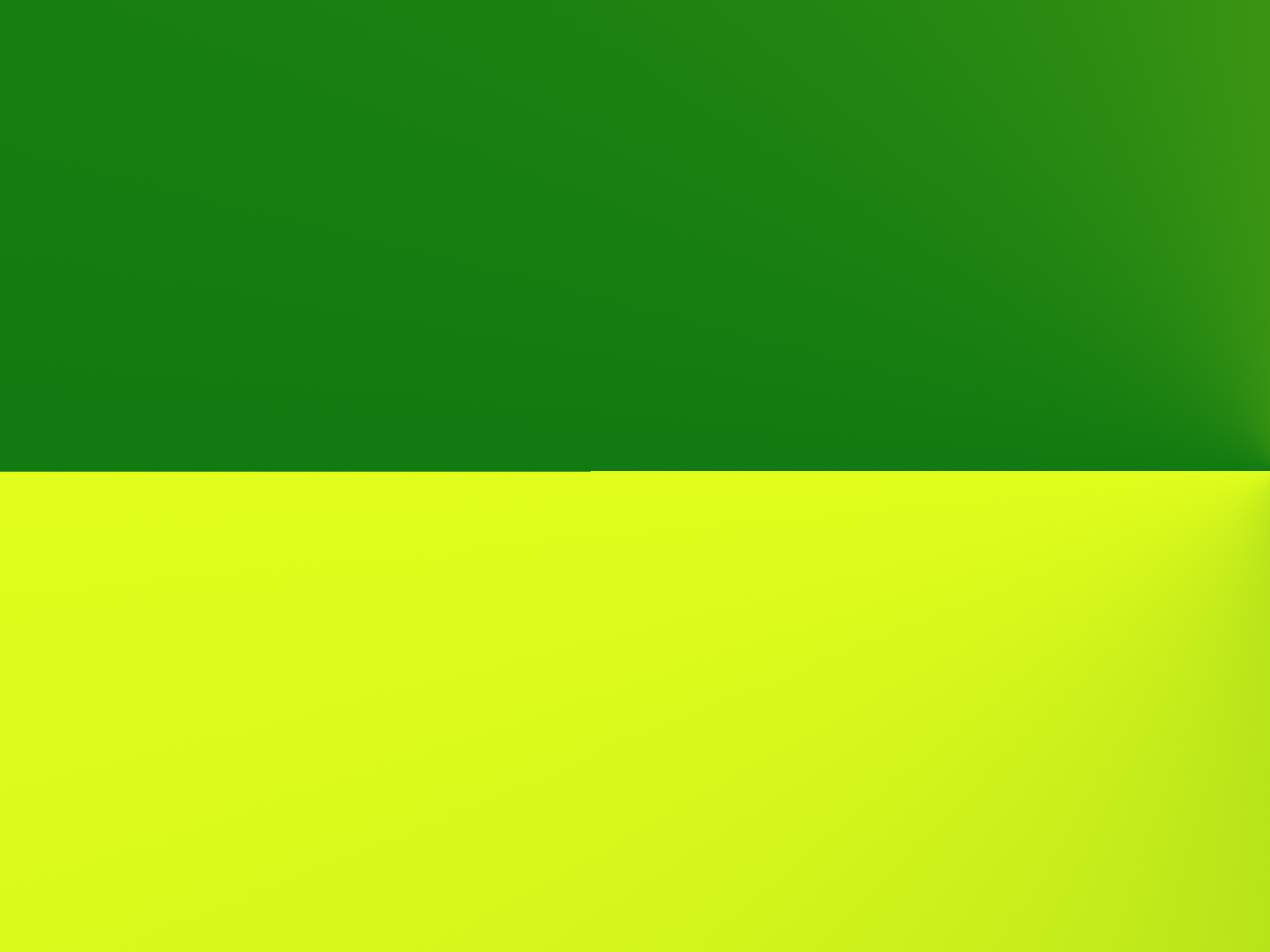 العلم